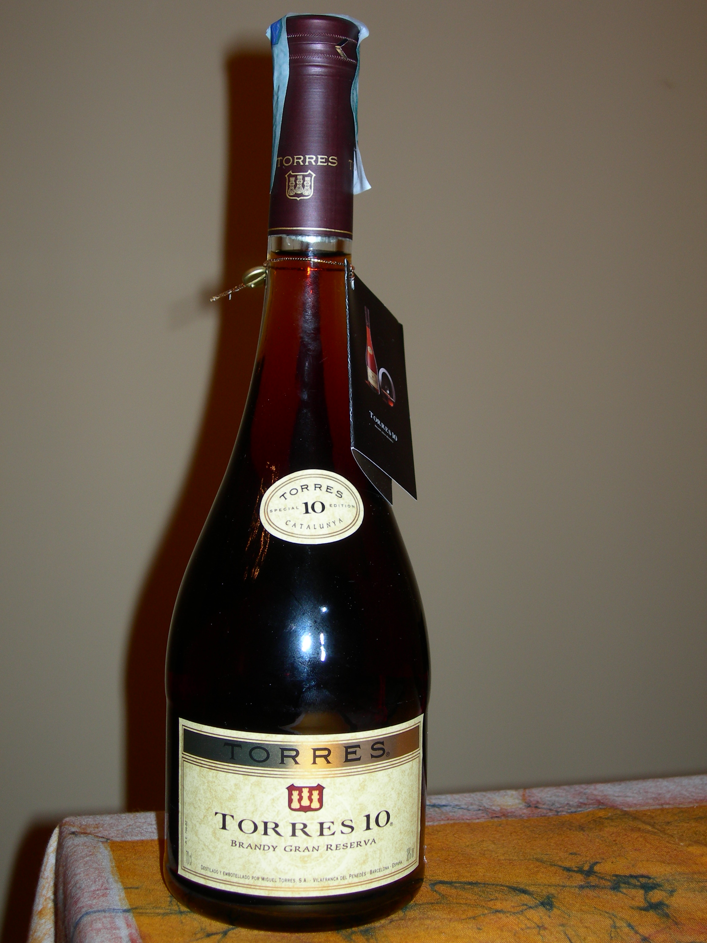 Bottiglia di brandy spagnolo